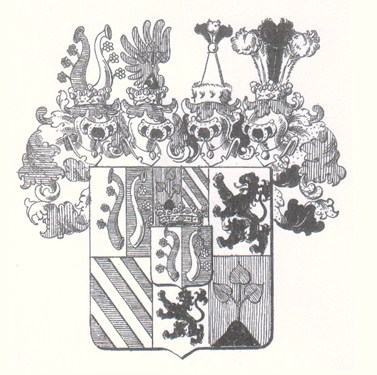 Graf von Gaisruck -herb